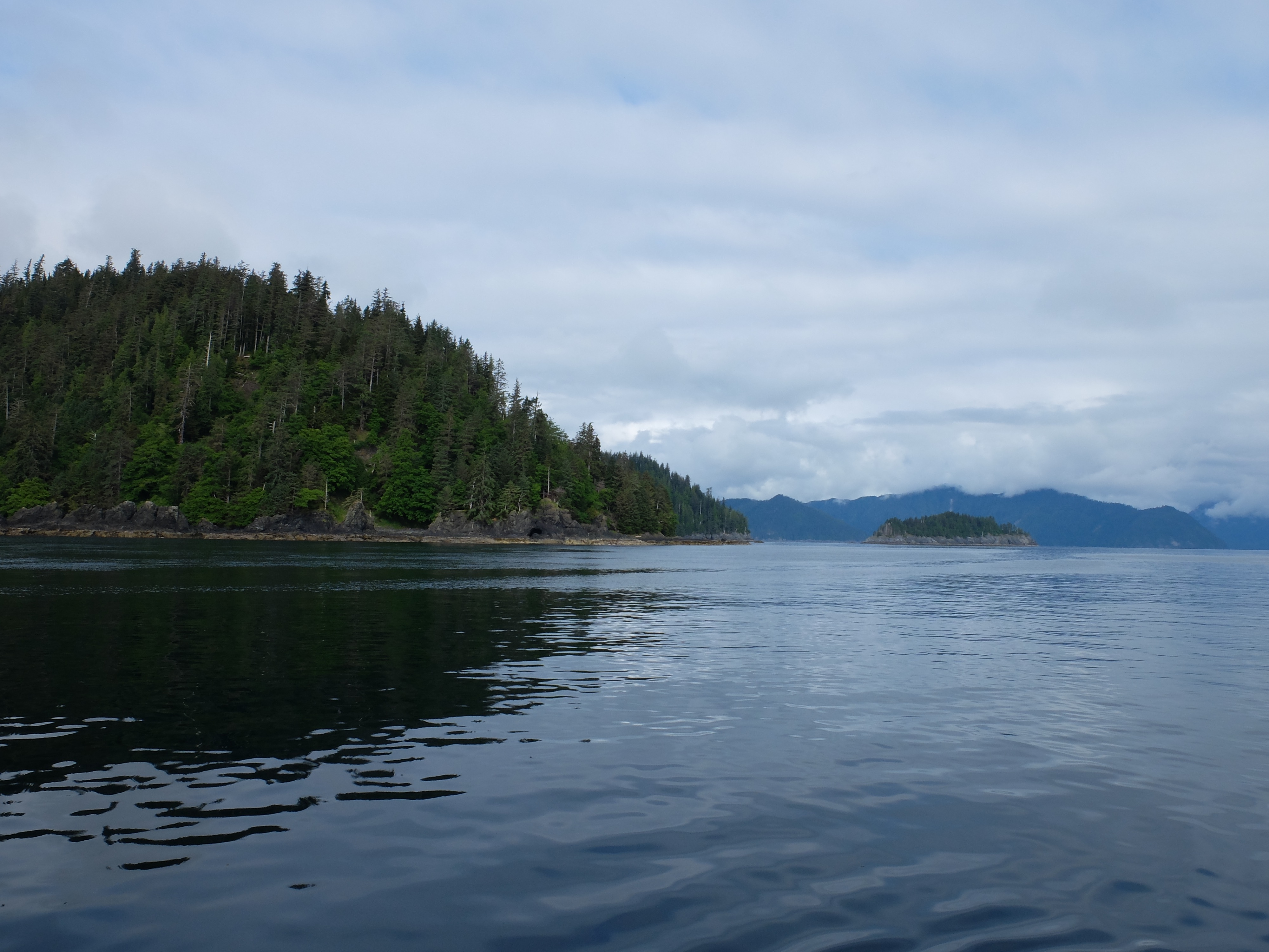 Gwaii Haanas